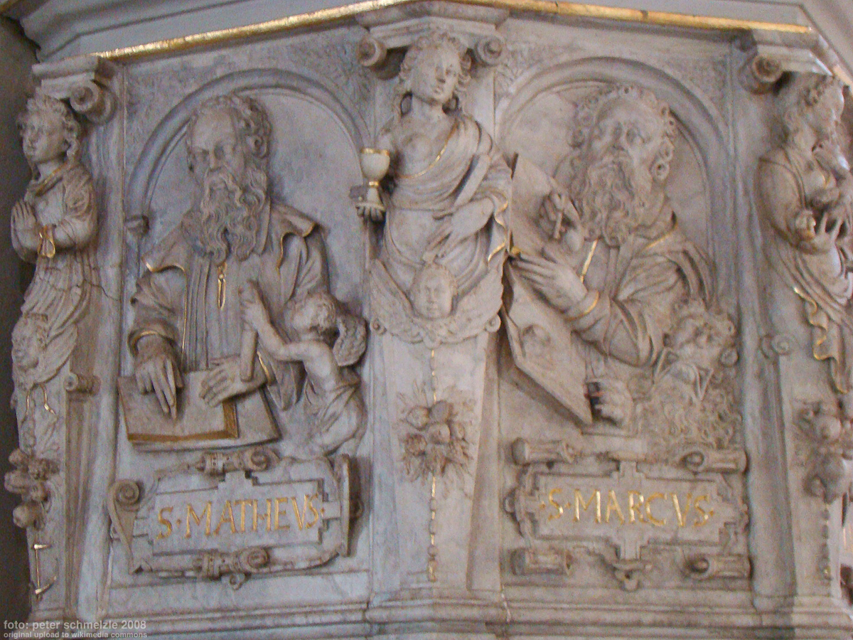 Detail an der Kanzel der Stadtkirche St. Salvator in Neckarbischofsheim, Darstellung: Evangelisten Matthäus und Markus